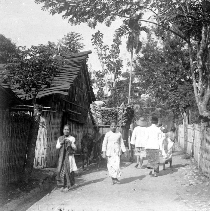 Repronegatief. Weltevreden, kampong Gang Zecha, West-Java